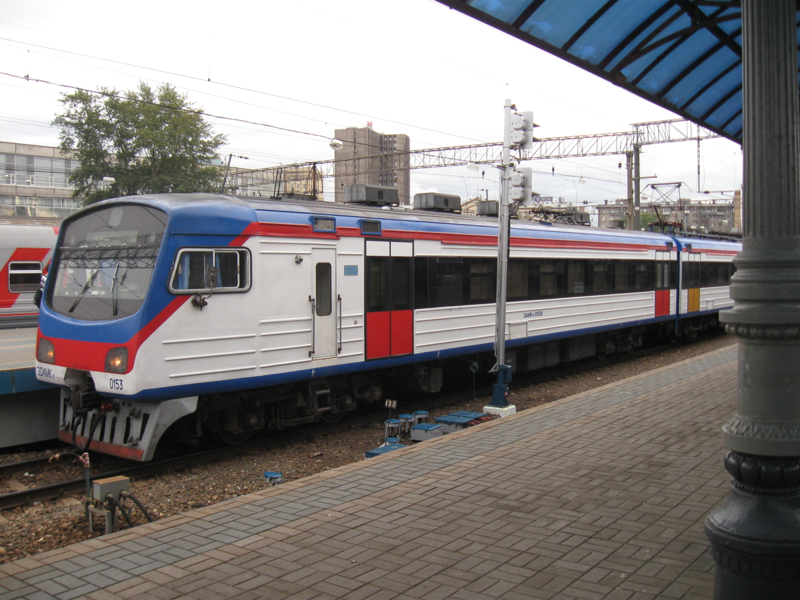 Электропоезд ЭД4МКу-0153 на станции Москва-Ярославская. Вагон ЭД4МКу-015309 (прицепной головной)